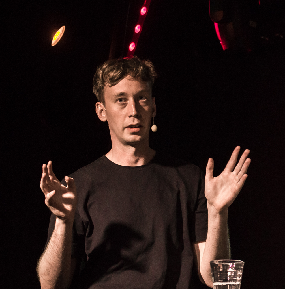 Victor Malm under samtalet "Kan man lita på populärvetenskapen?" på Forum/Debatt på Kulturhuset Stadsteatern i Stockholm den 4 september 2019.